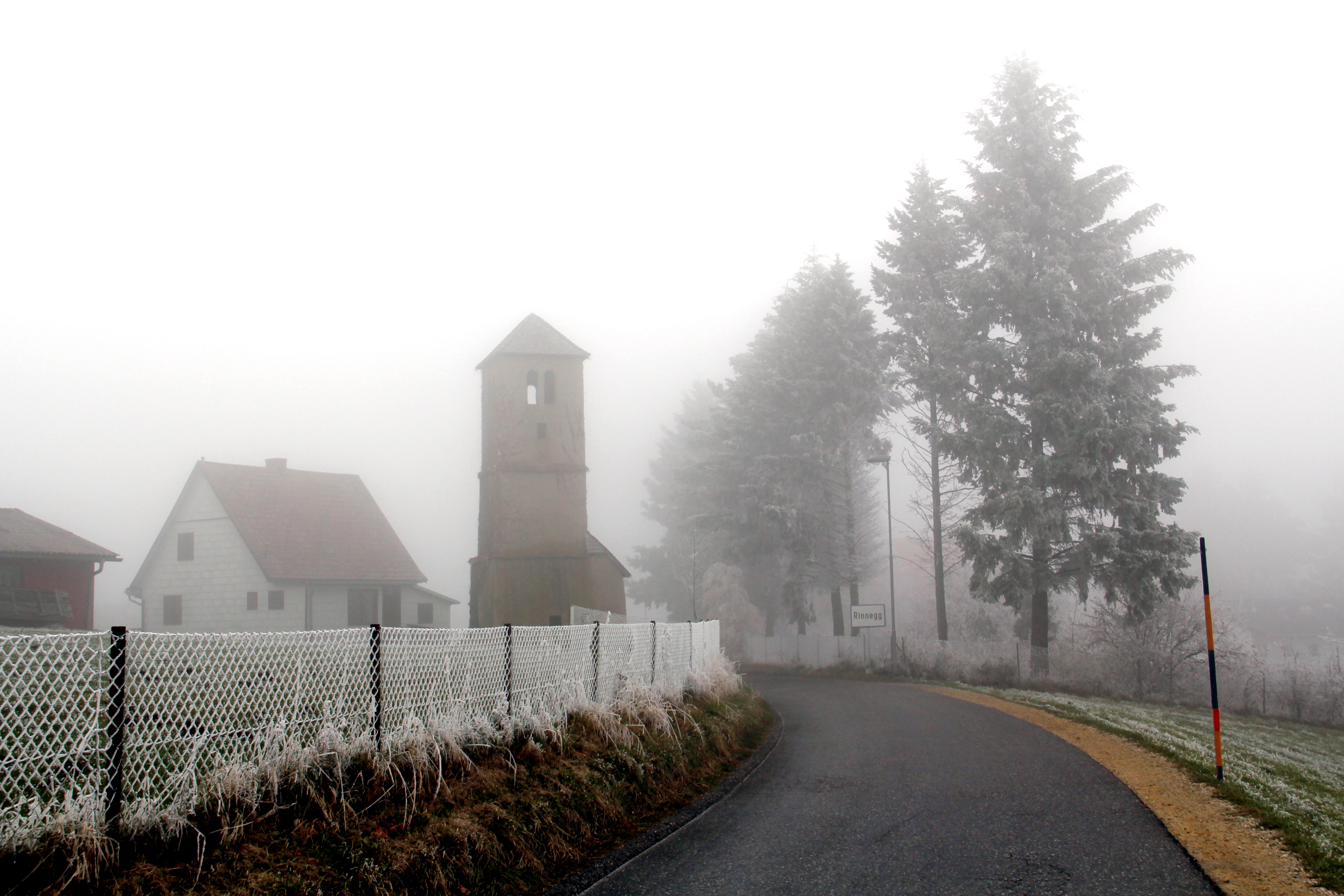 Wetterturm im Ortsteil Rinnegg, Gemeinde St. Radegund bei Graz (Steiermark), Österreich.